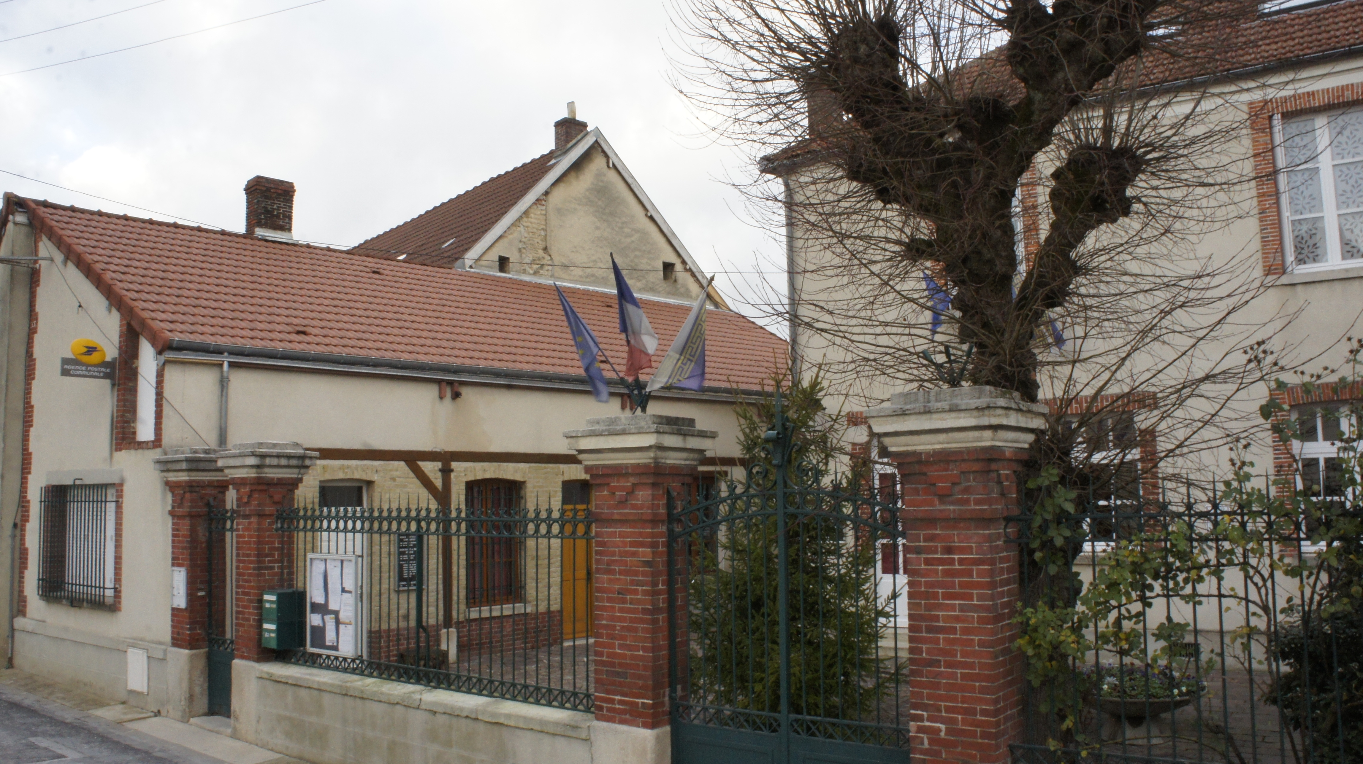 La Mairie_et la Poste à Chouilly.